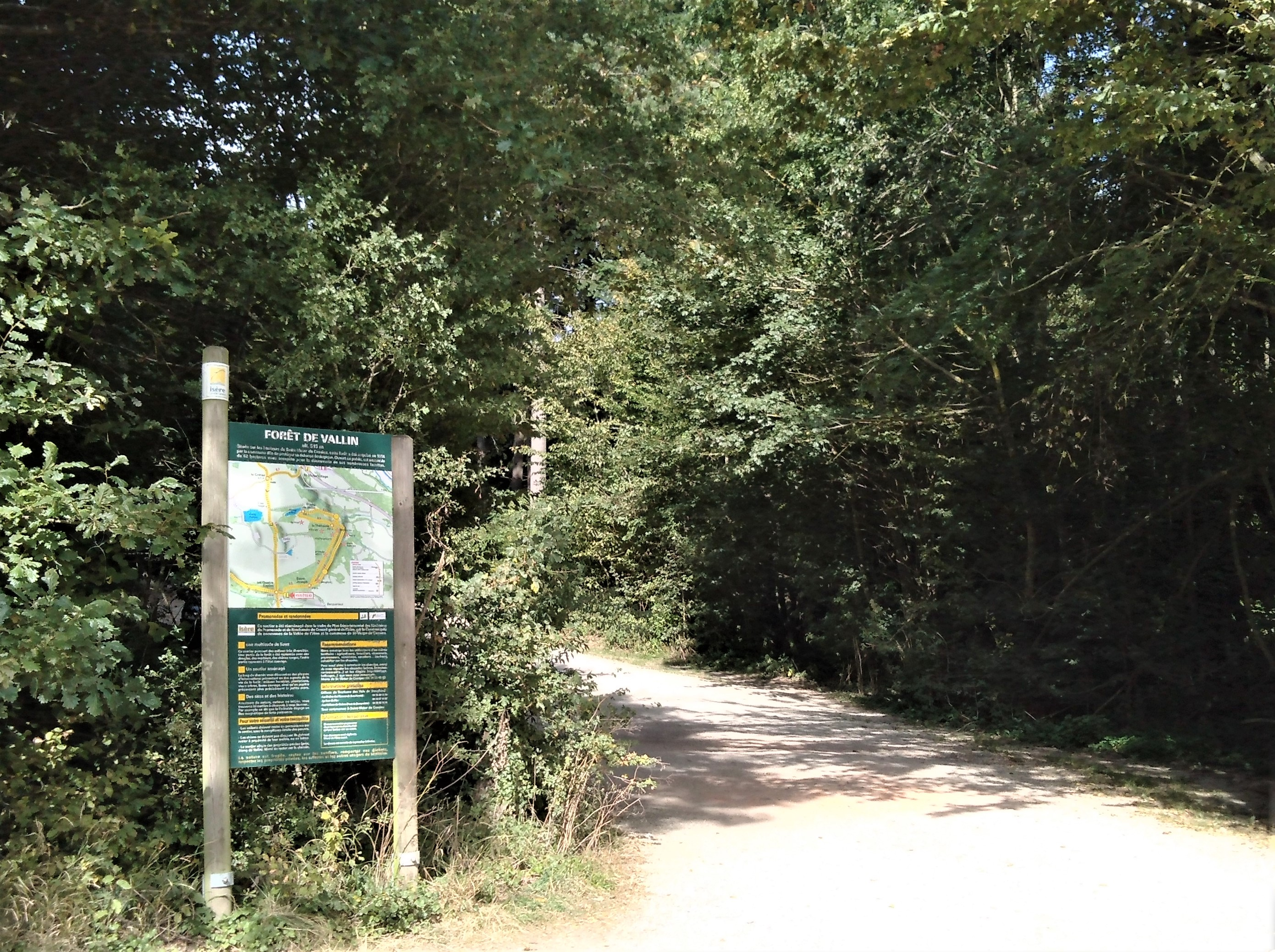 Entrée de la Forêt de Vallin en septembre 2019